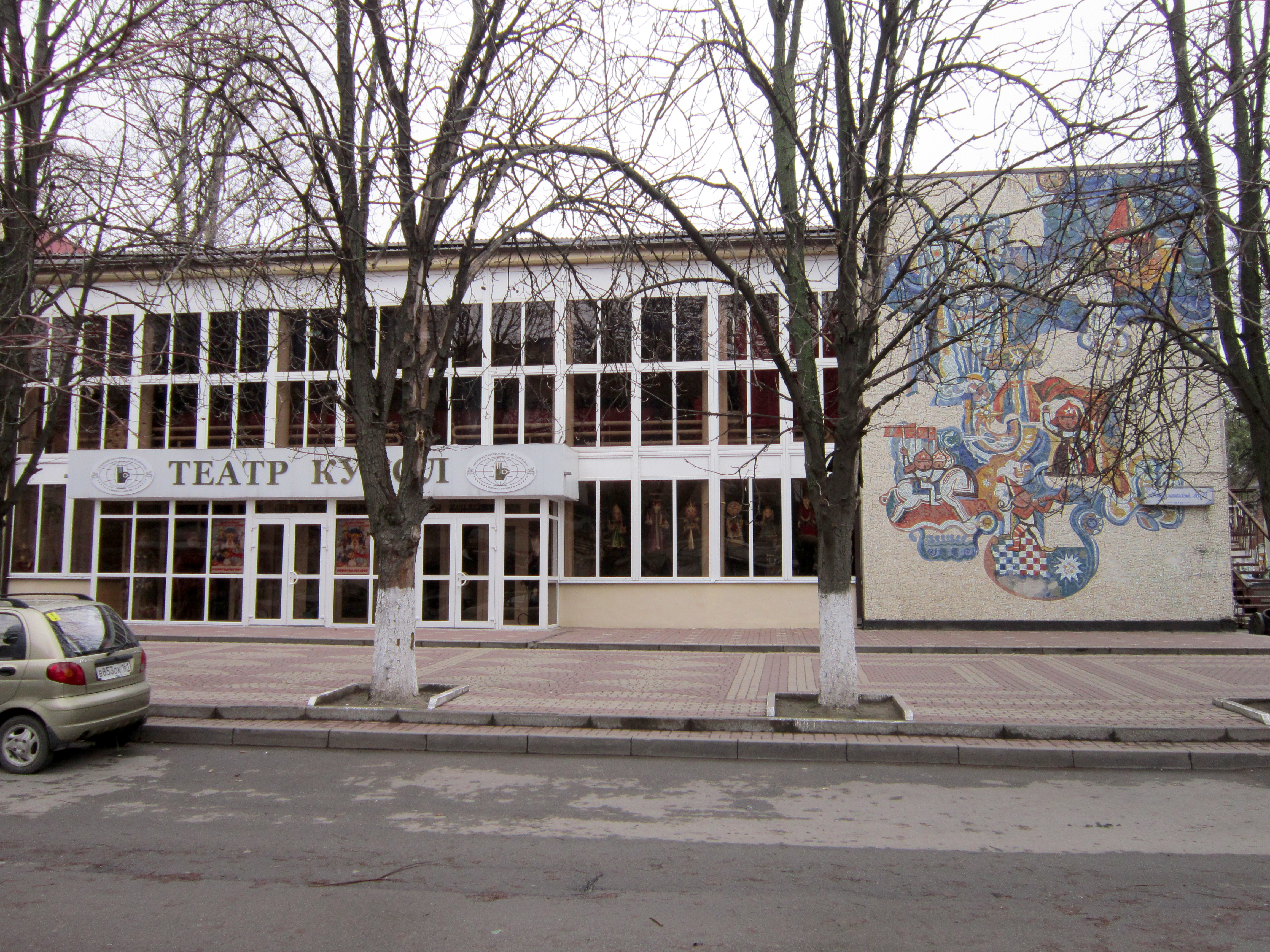 Ростовский Государственный Театр Кукол им. В.С. Былкова